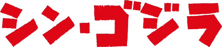 シン・ゴジラ